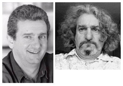 Patrice Zonta